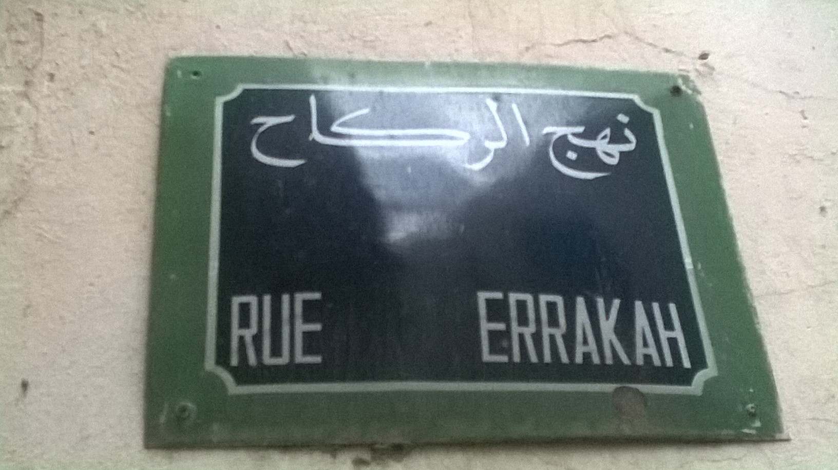 La médina de Tunis مدينة تونس العتيقة